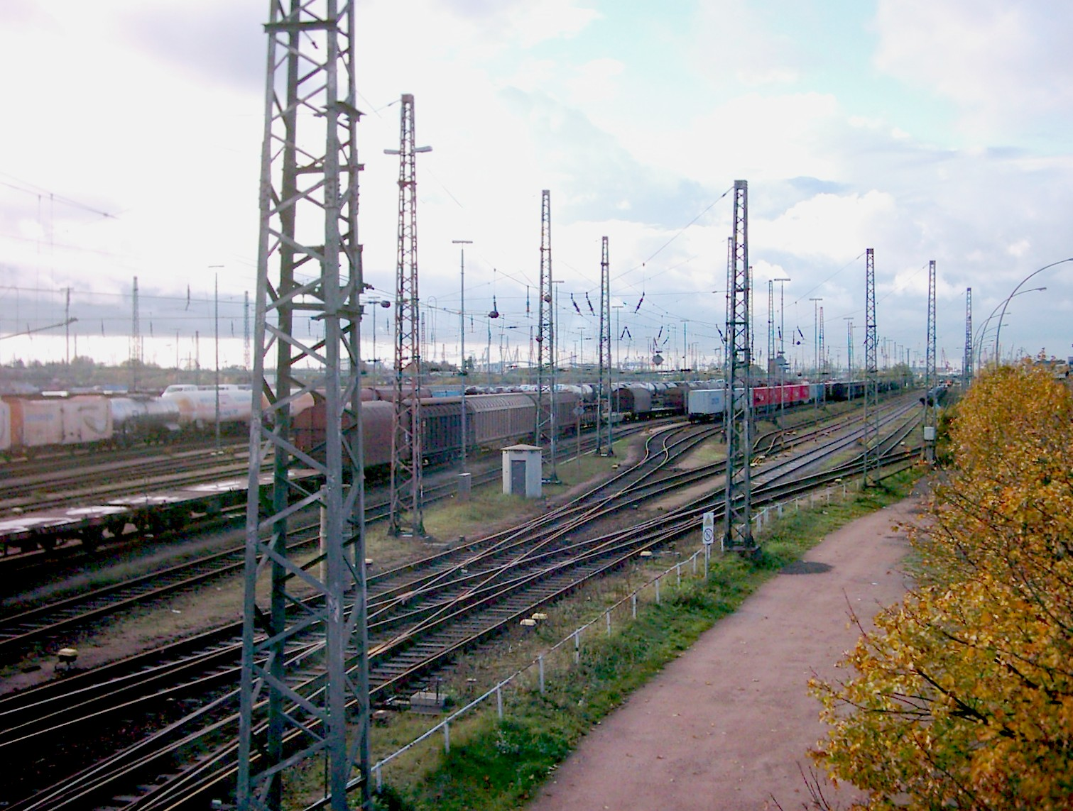 Hafenbahnhof Hamburg Süd zwischen Spreehafen und Veddeler Damm. Blick nach Westen.